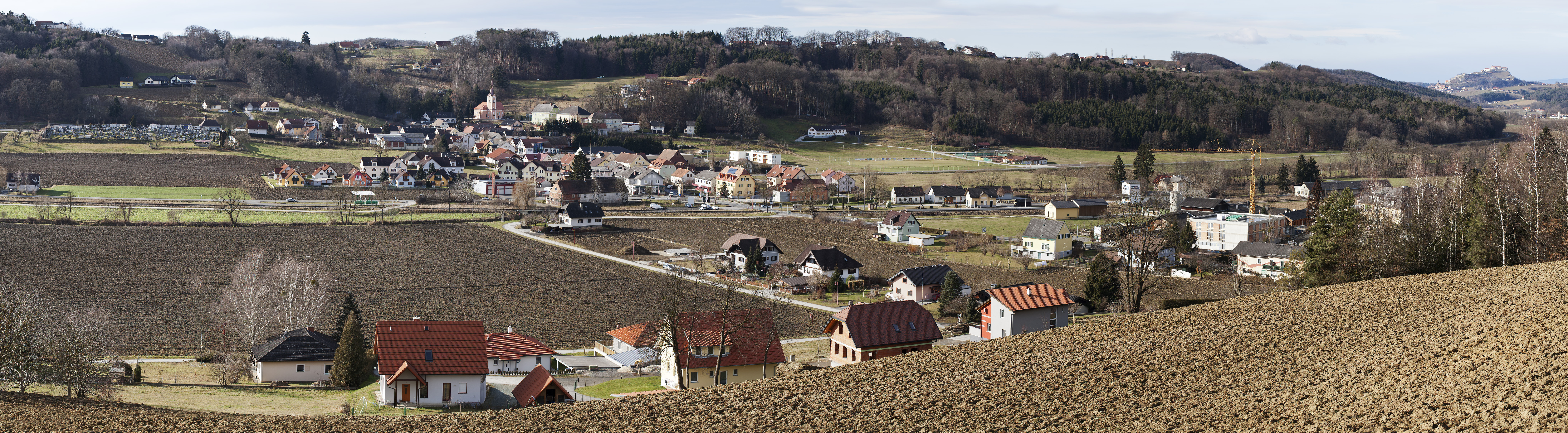 Hatzendorf von Nordosten